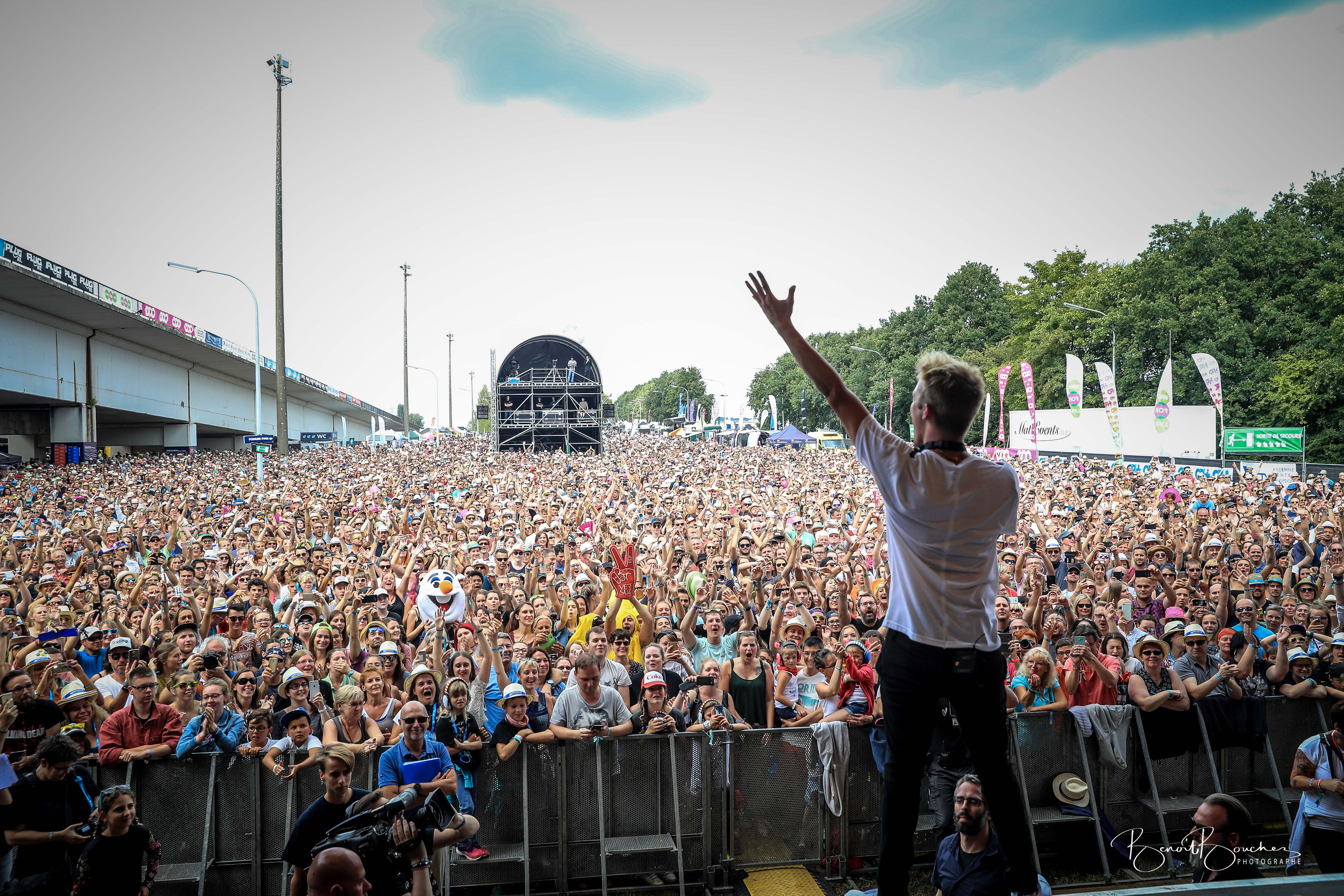 Mustii sur la scène principale du Ronquières Festival 2017 (photo Benoit Bouchez)